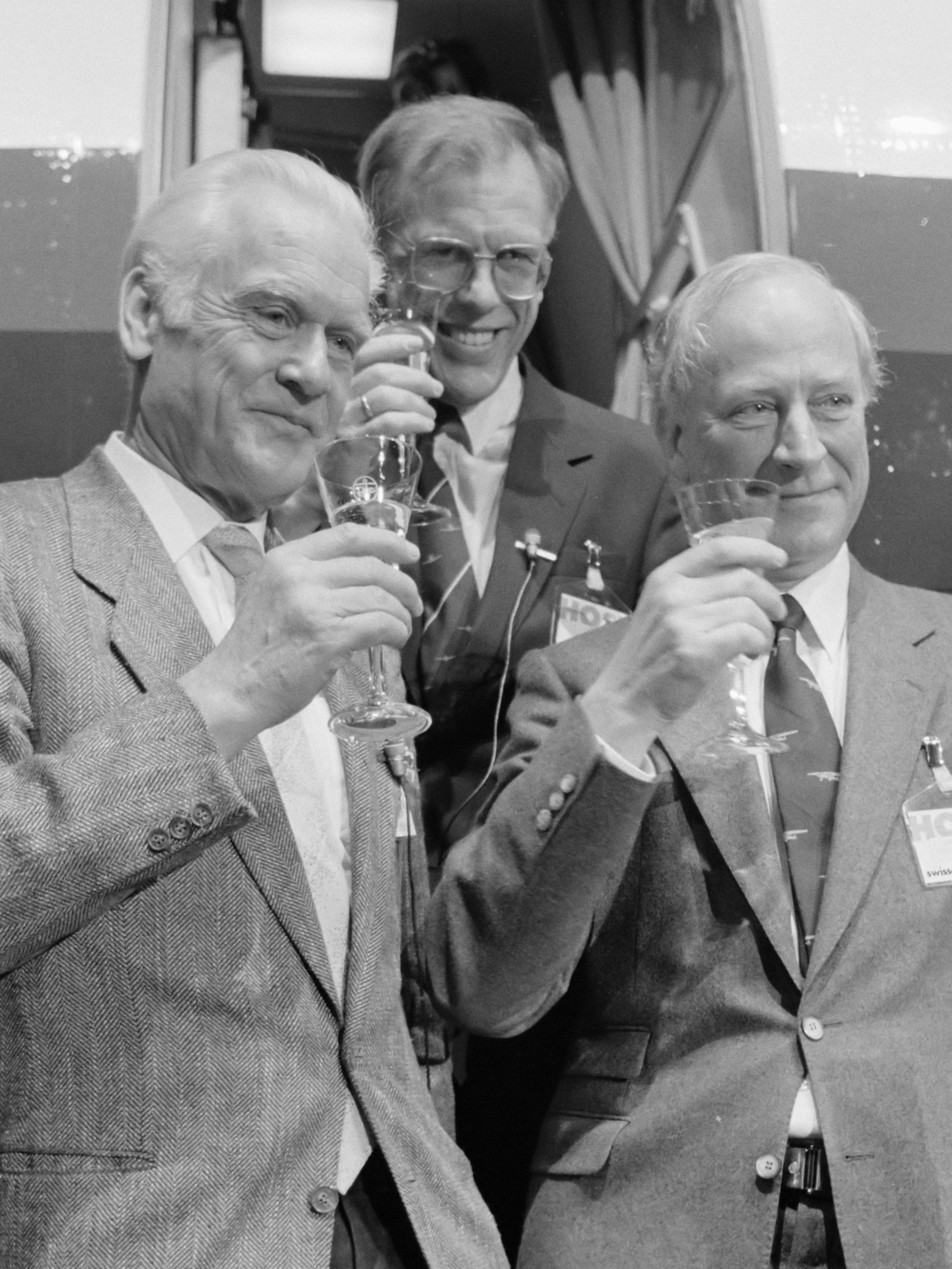 Overdracht 1e Fokker-100 aan Swissair; tijdens toast op de trap van de Fokker v.l.n.r. Swissair Robert Staubli, Van Duinen en Frans Swarttouw 29 februari 1988